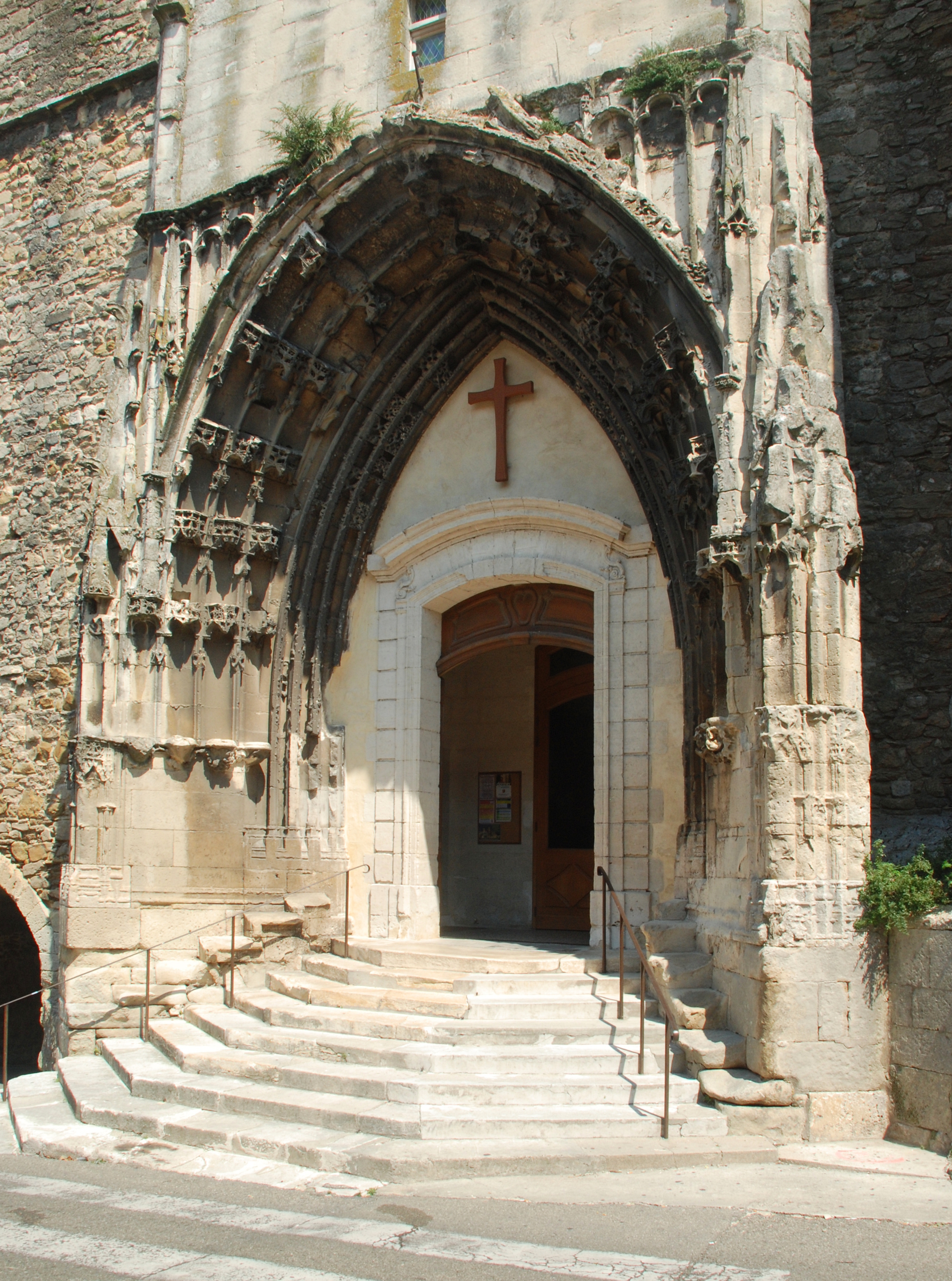 France - Gard - Pont-Saint-Esprit - Église Saint-Saturnin .